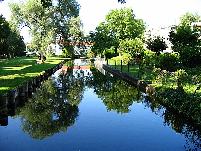 Gröbenbach in Dachau